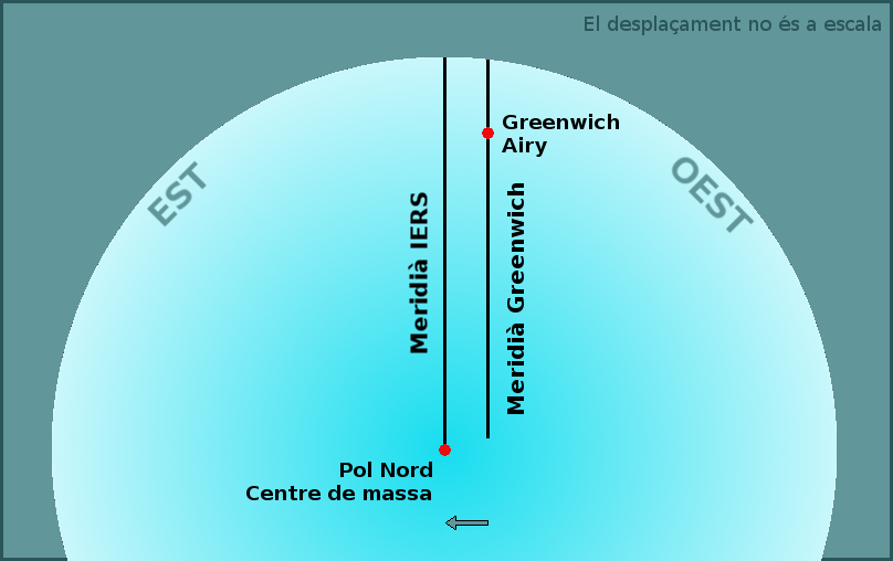 Croquis de situació del meridiaà IERS